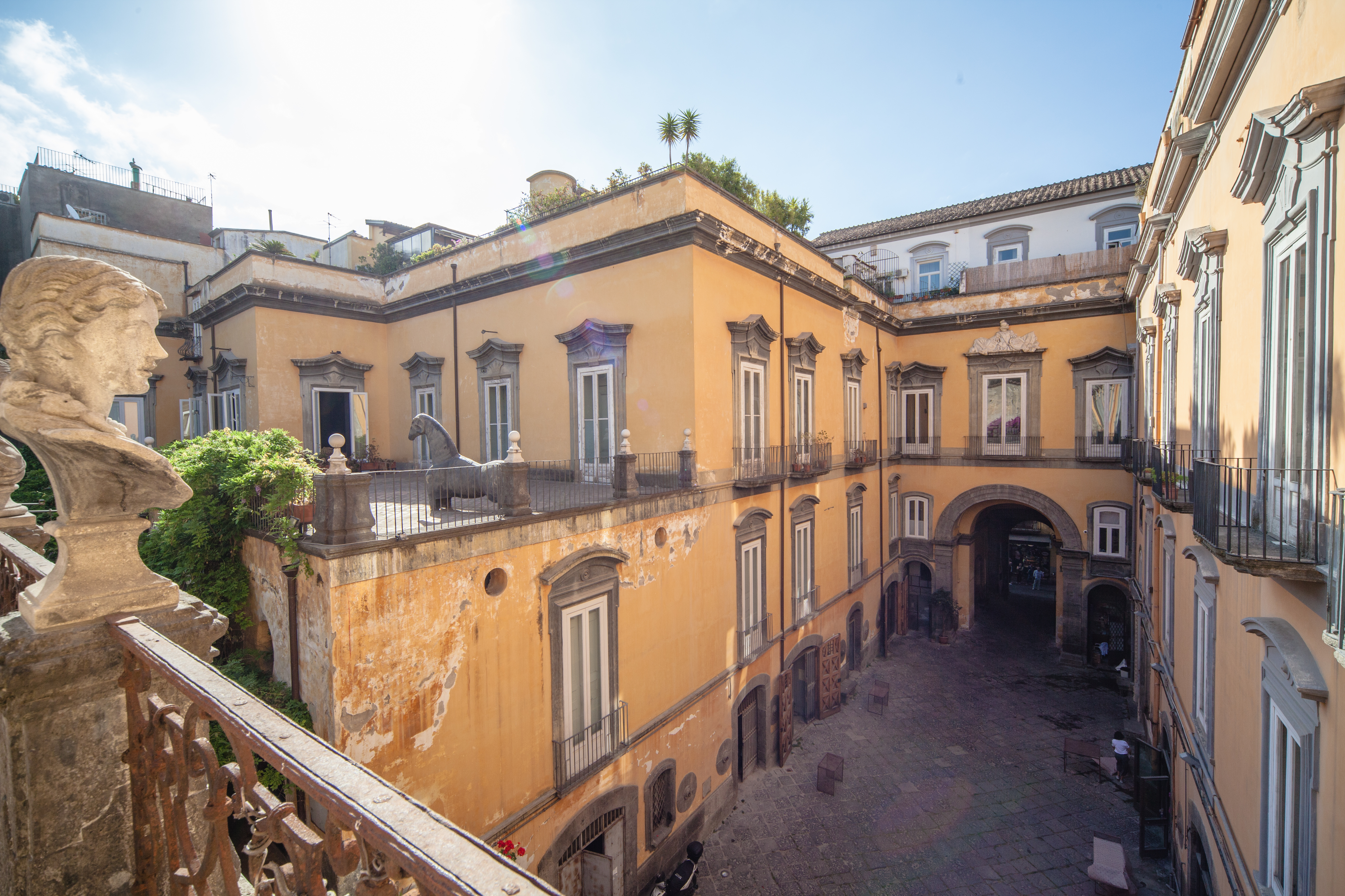 Vista su cortile interno Palazzo Marigliano